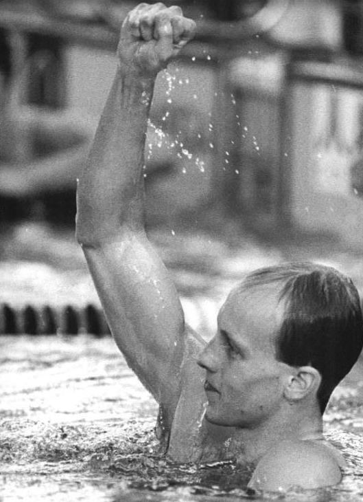 Frank Baltruch ADN-ZB Settbik-21.7.88 Potsdam: DDR-Meisterschaften im Schwimmen- Die 100-M-Rückenentscheidung gewann der Vorjahresmeister Frank Baltruch (SC Magdeburg) in hervorragenden 2:00,44 min.